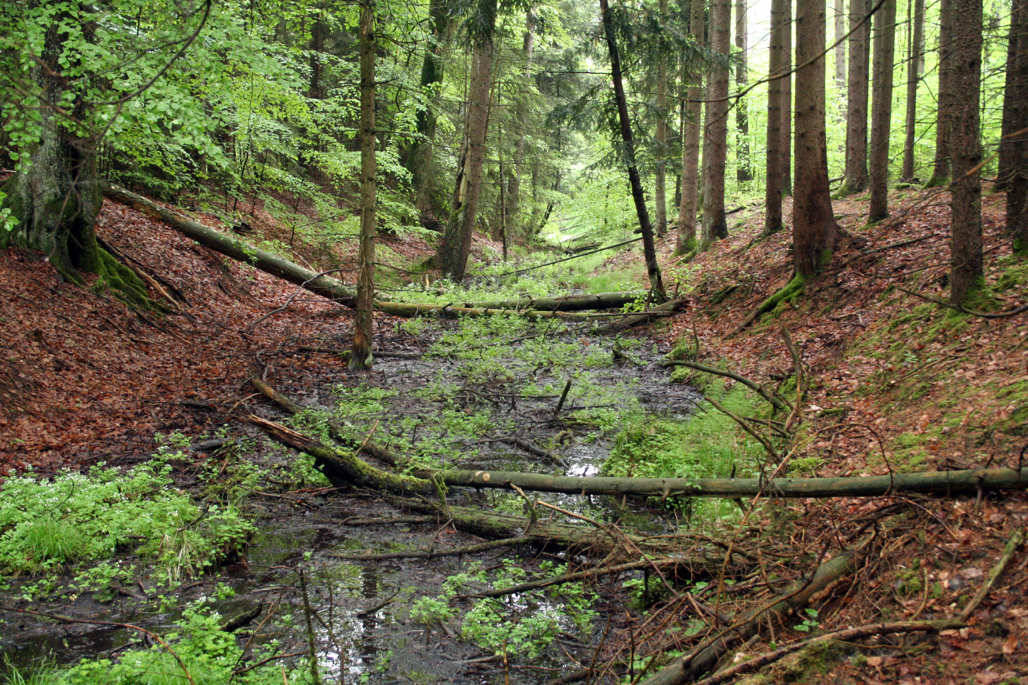 Gefütterter Graben